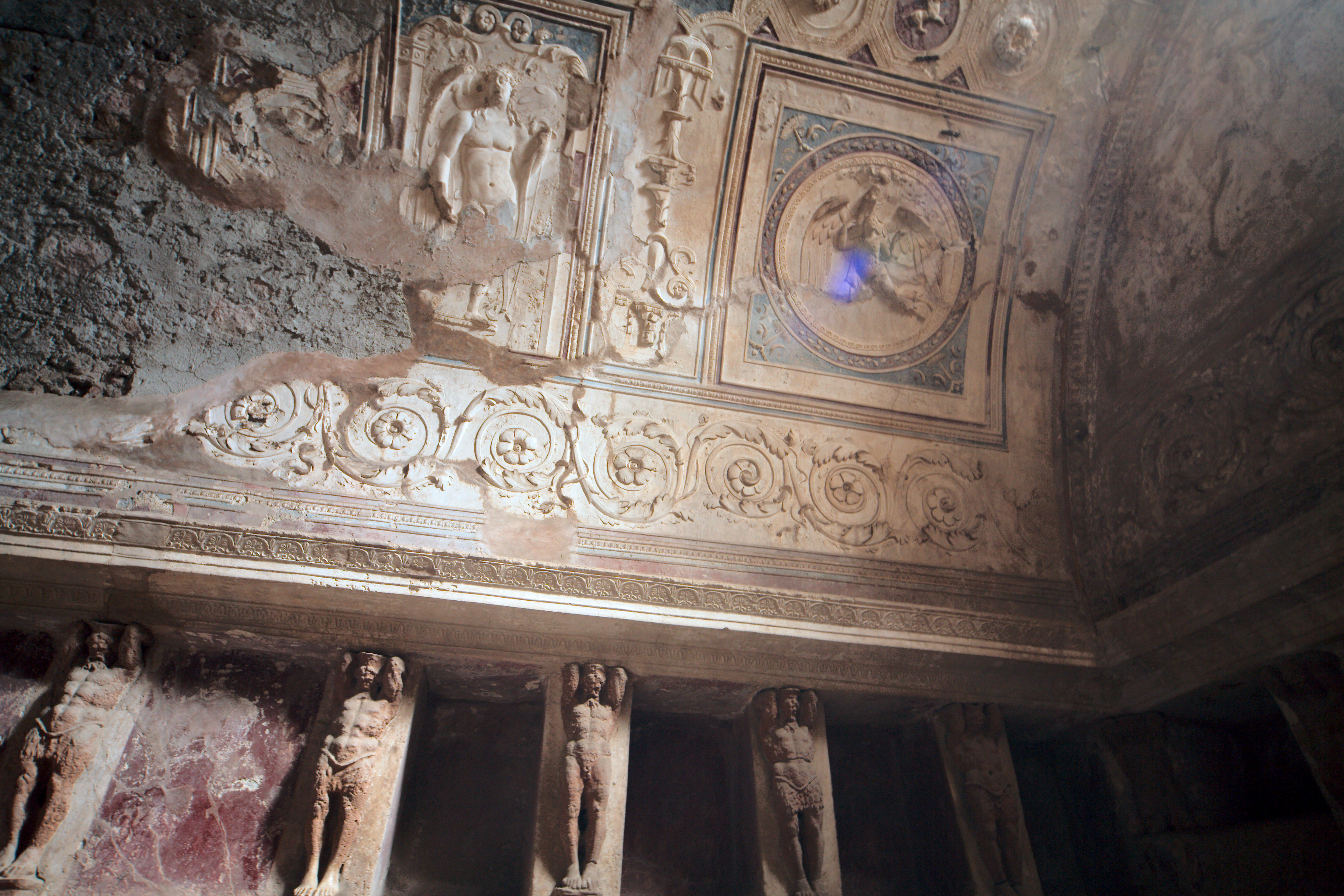 Forum Thermae (Pompeii)